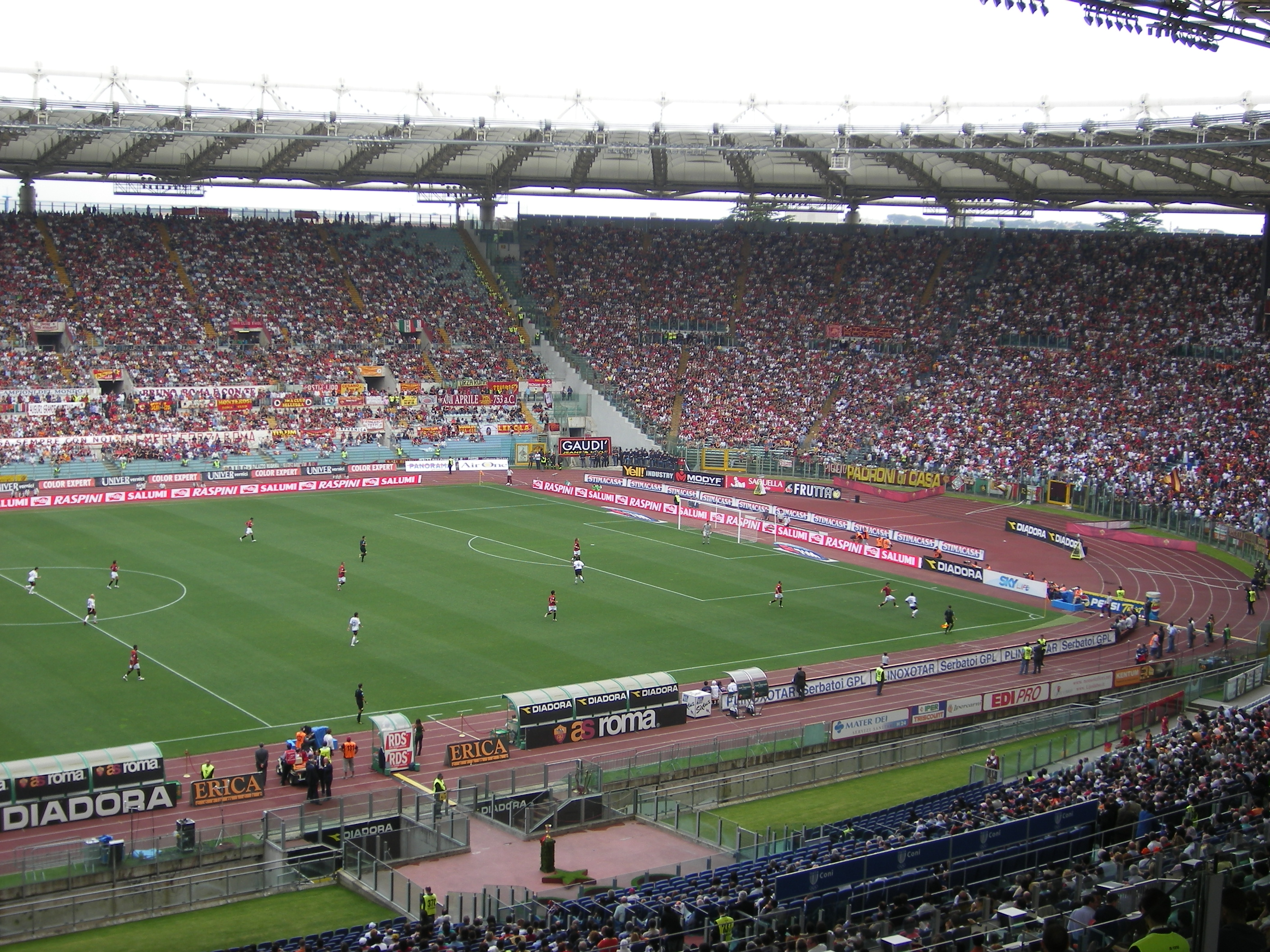 Stadio Olimpico during an AS Roma match